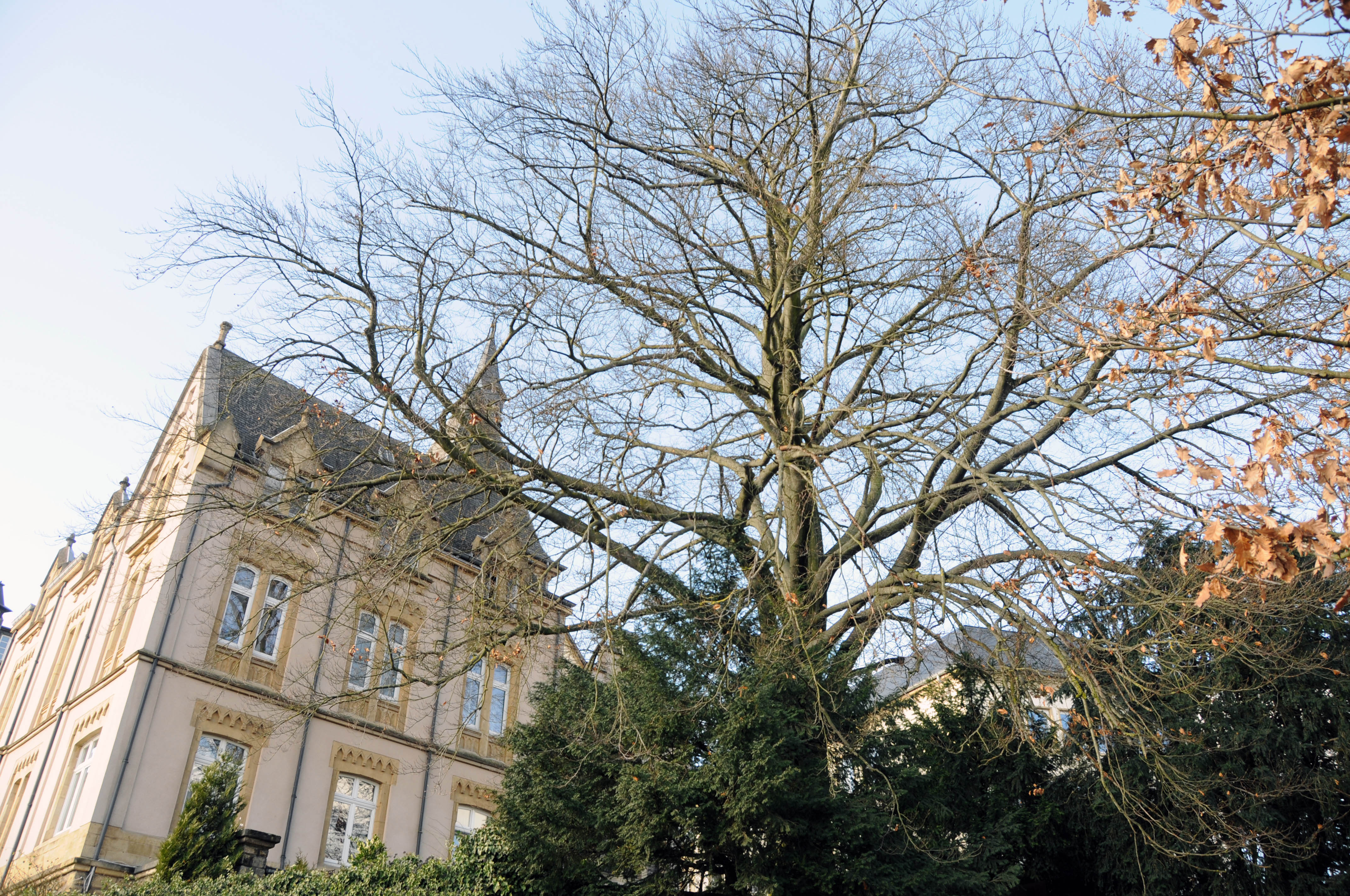 Buch bei der Méchelskierch, vun der Corniche aus gesinn